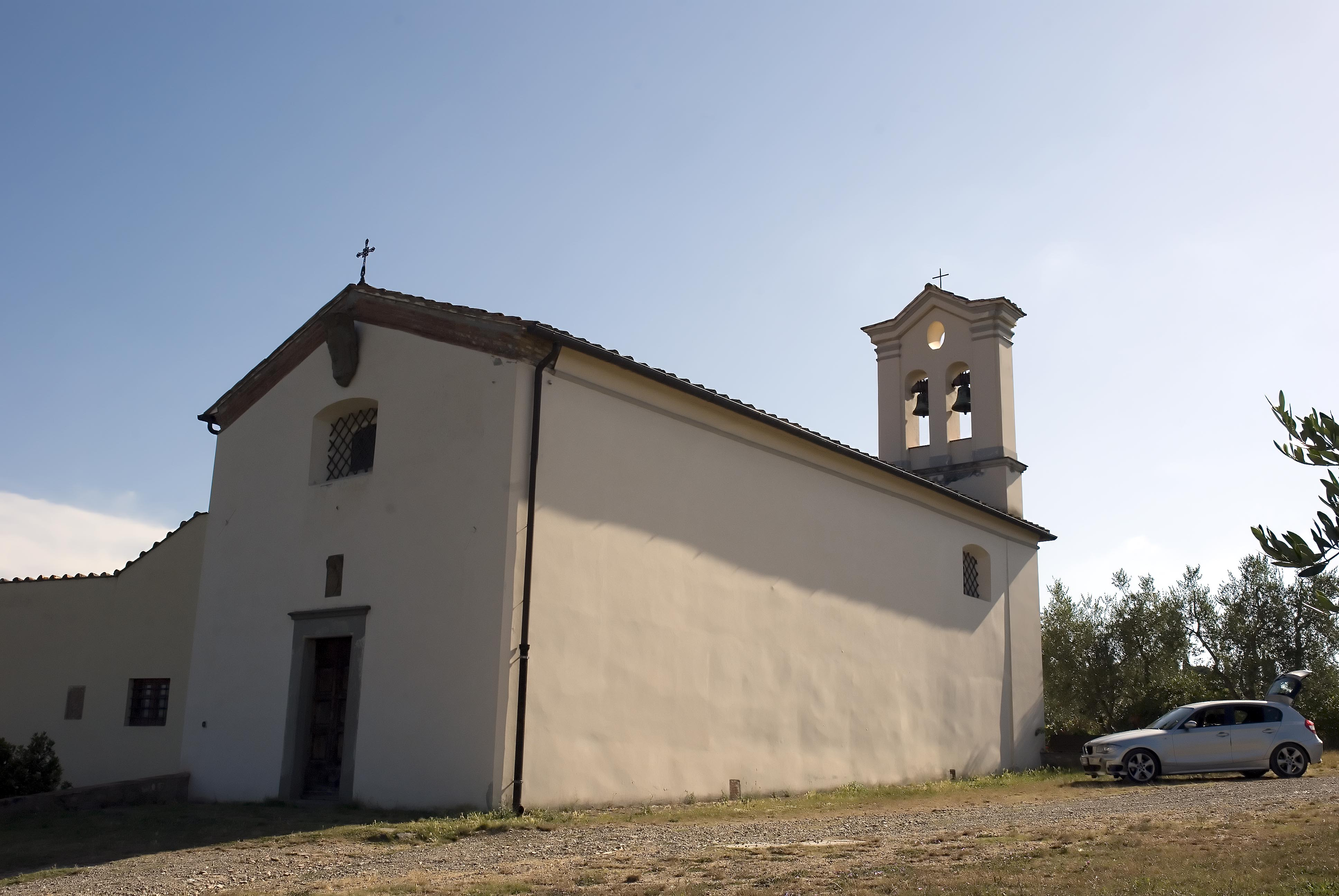 Chiesa di Santa Maria a Casavecchia